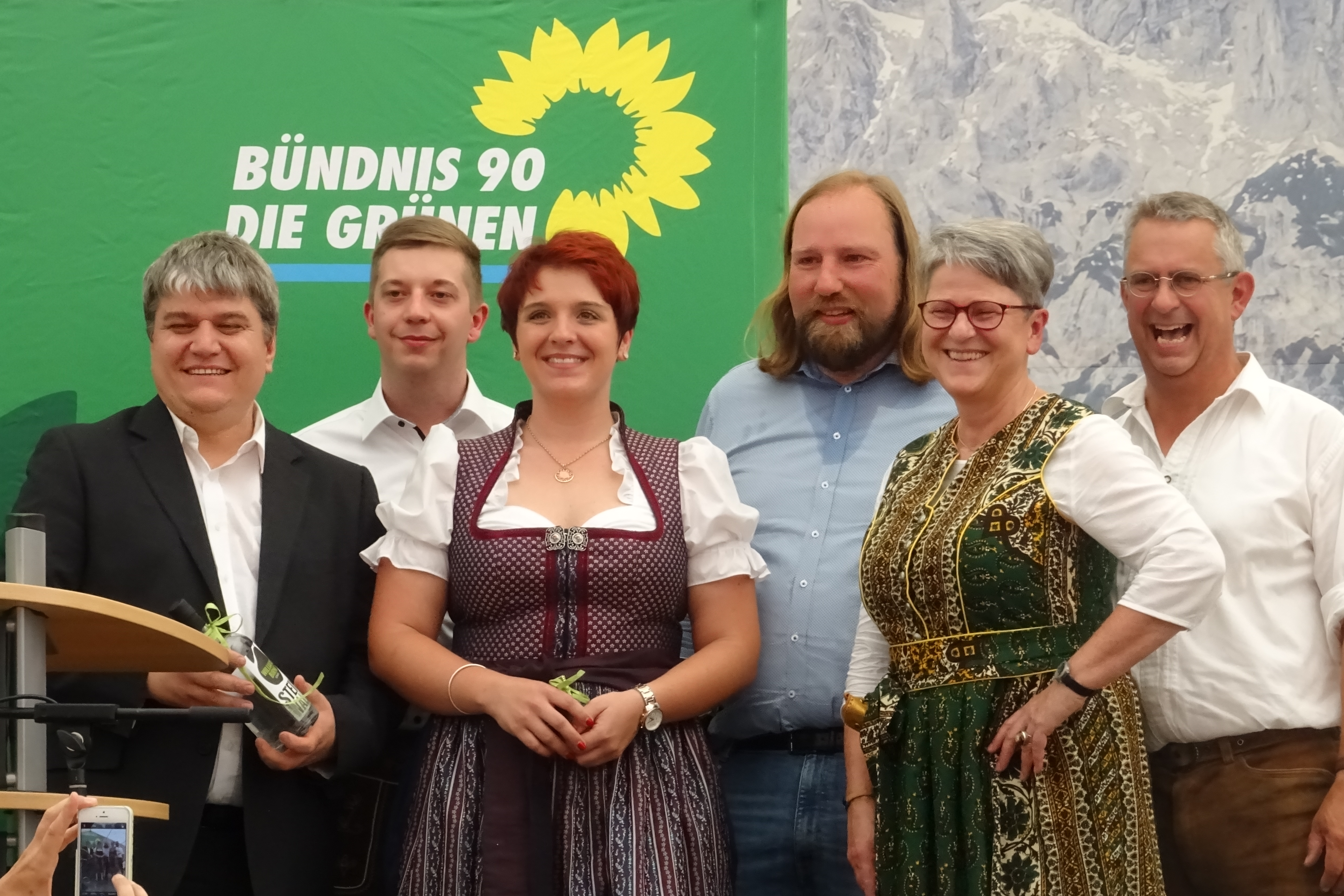 Kemnather Wiesenfest. Von links: Bezirksvorsitzender MdB Stefan Schmidt, Kreisvorsitzender Fabian Neuser, MdL Anna Toman, Grünen-Fraktionschef Toni Hofreiter, Kreisvorsitzende Heidrun Schelzke-Deubzer, Grünen-Ortsvorsitzender Stefan Zaus